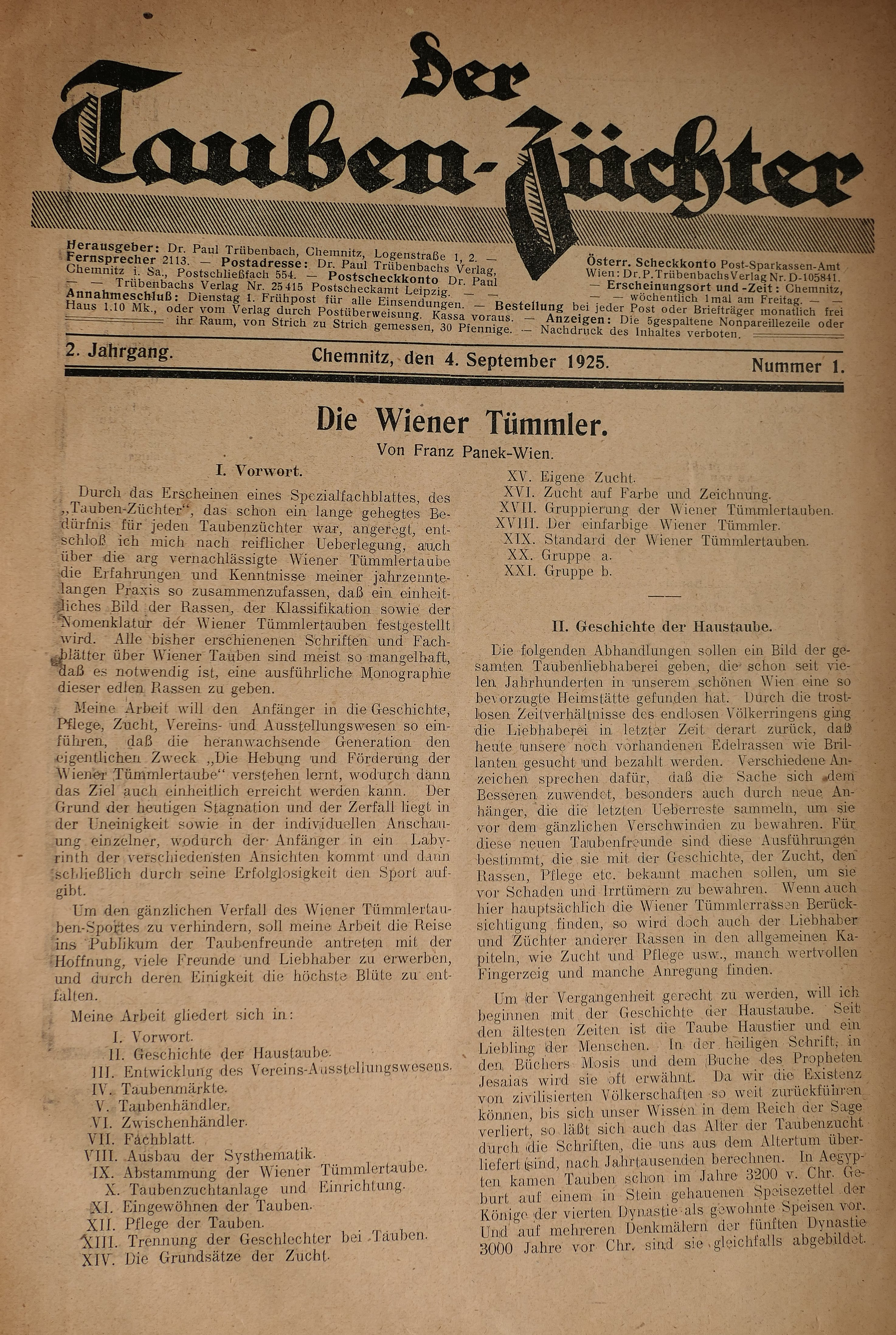 Der Taubenzüchter (1925) Verlag Dr. Paul Trübenbach